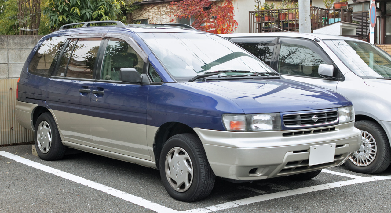 Nissan Prairie Joy ( M11 )